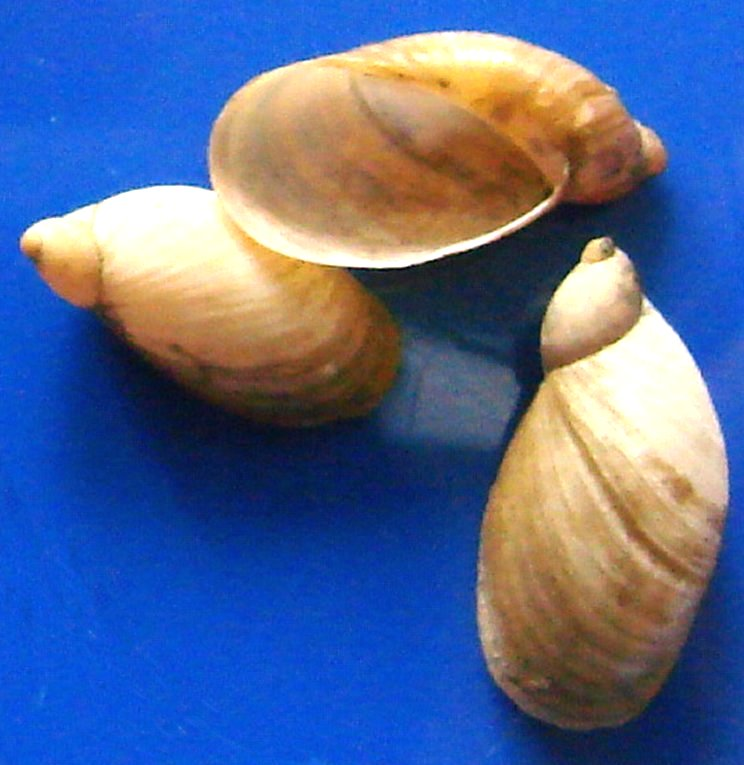 Succinea Pfeifferi